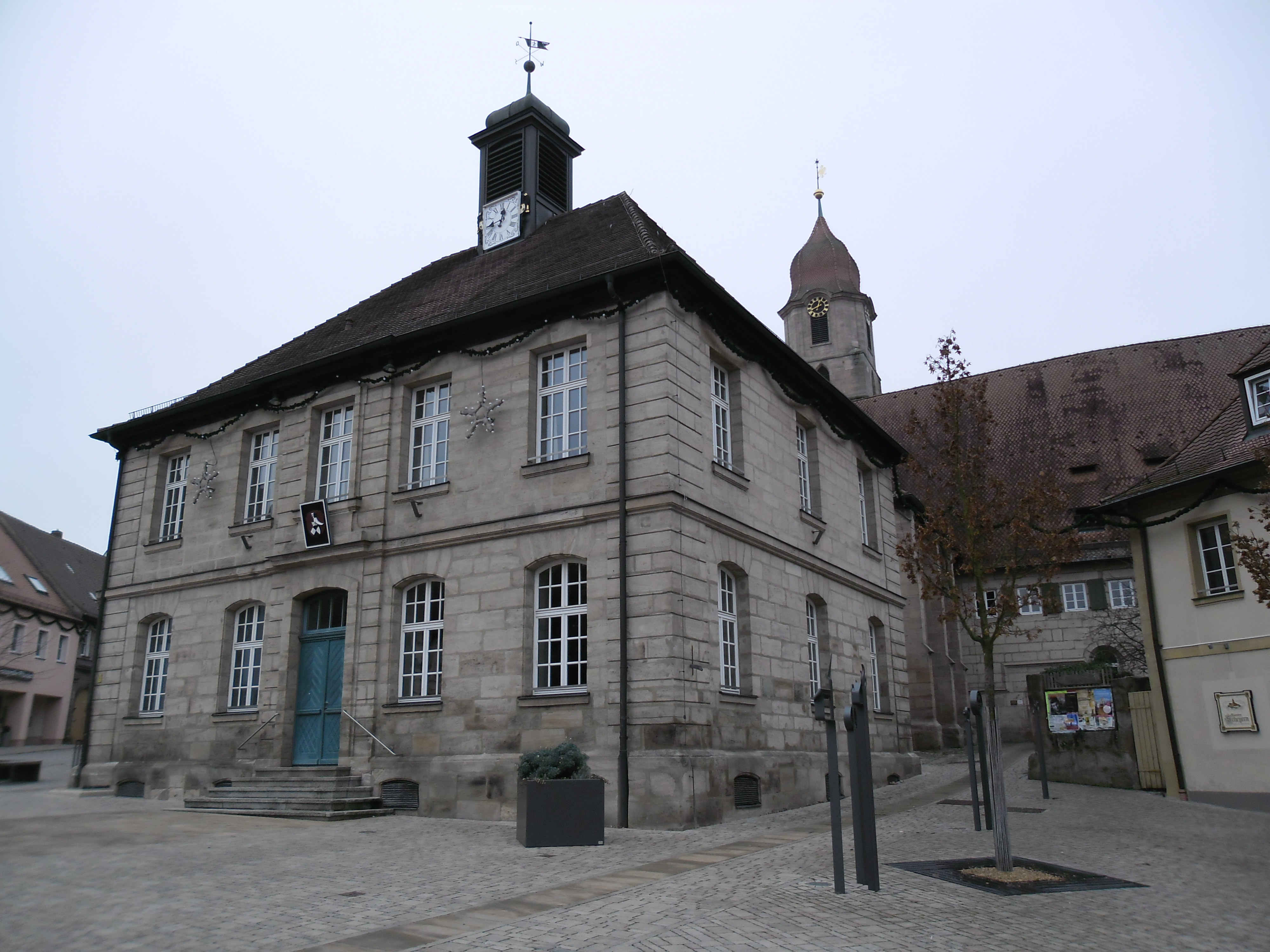 Einige Ansichten der mittelfränkischen Stadt Langenzenn, aufgenommen entlang der Friedrich-Ebert-Straße, des Prinzregentenplatzes, der Hindenburgstraße und der Würzburger Straße